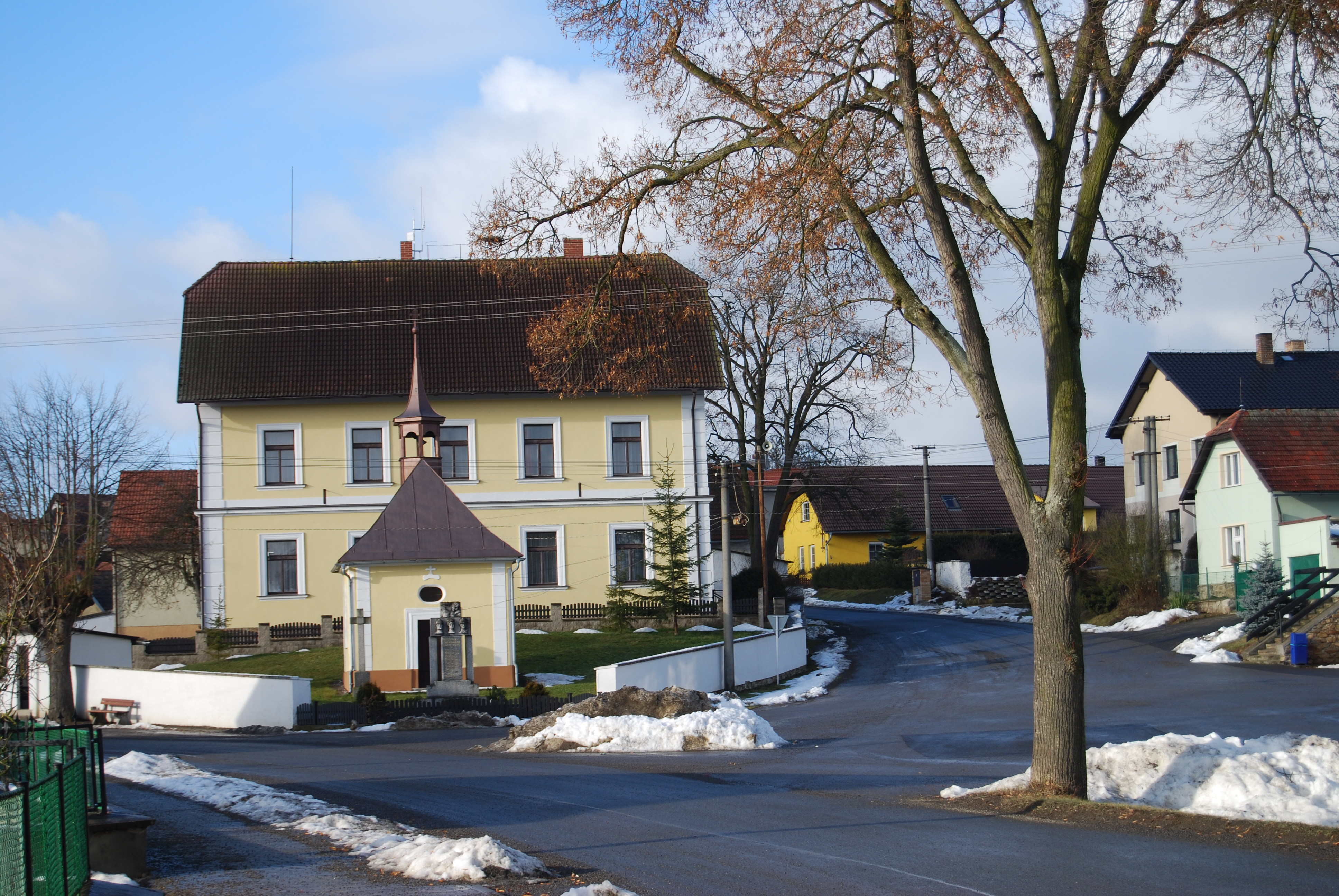 Pohled na náves, kapli Nejsvětější Trojice z roku 1852 a obecní úřad. Božetice. Okres Písek. Česká republika.